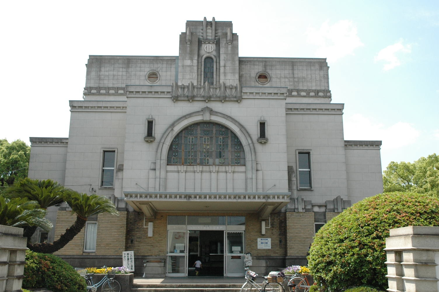 Kakogawa City Library